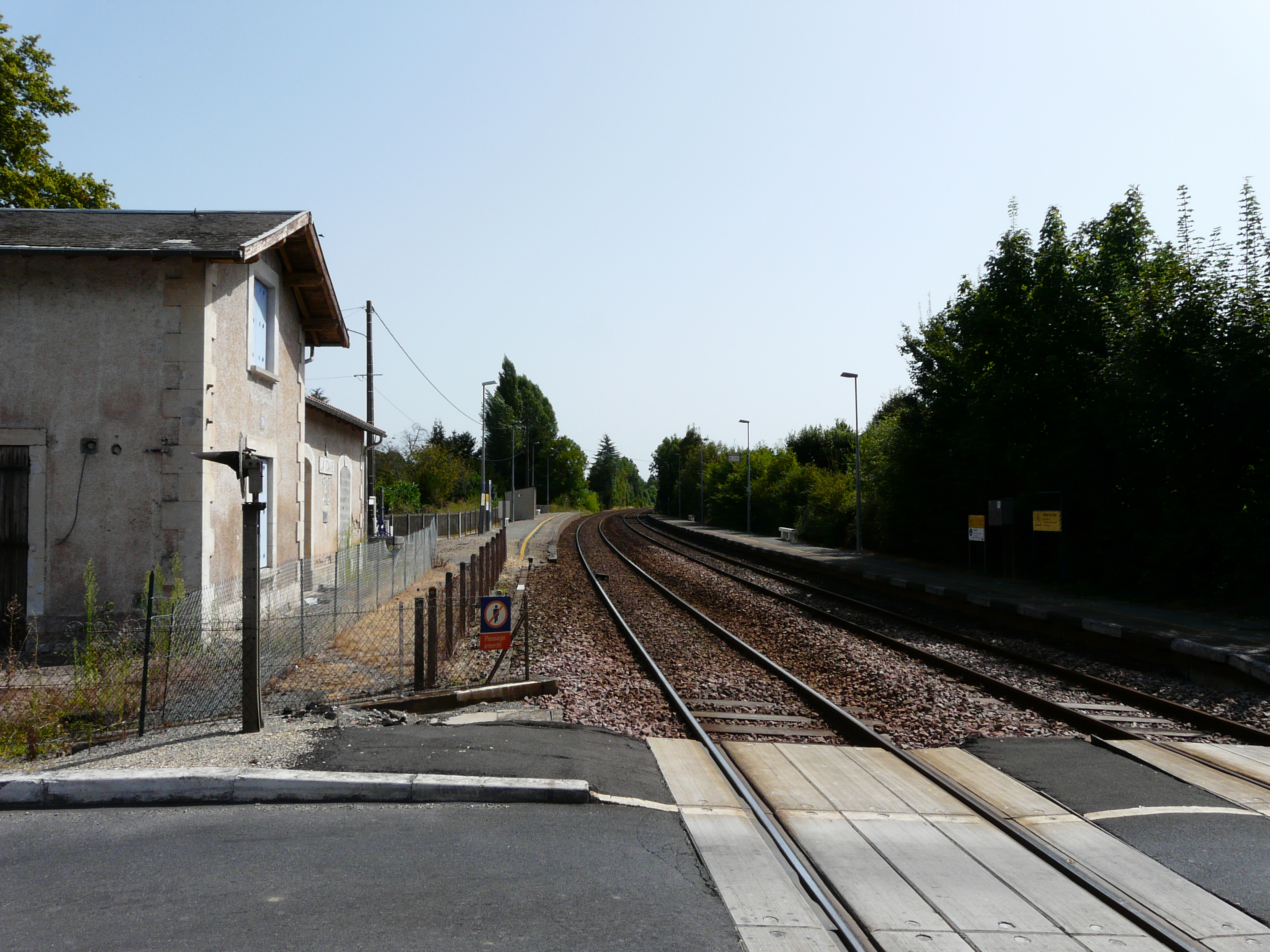 Les voies en gare de La Cave (direction Périgueux), Marsac-sur-l'Isle, Dordogne, France.